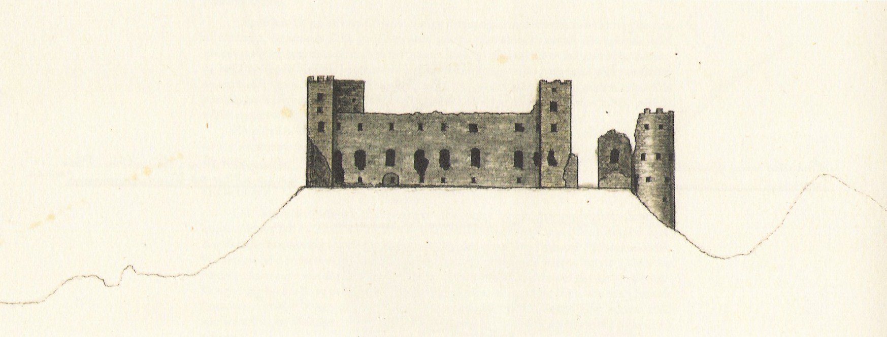 Rakvere linnuse varemed. Paulucci album